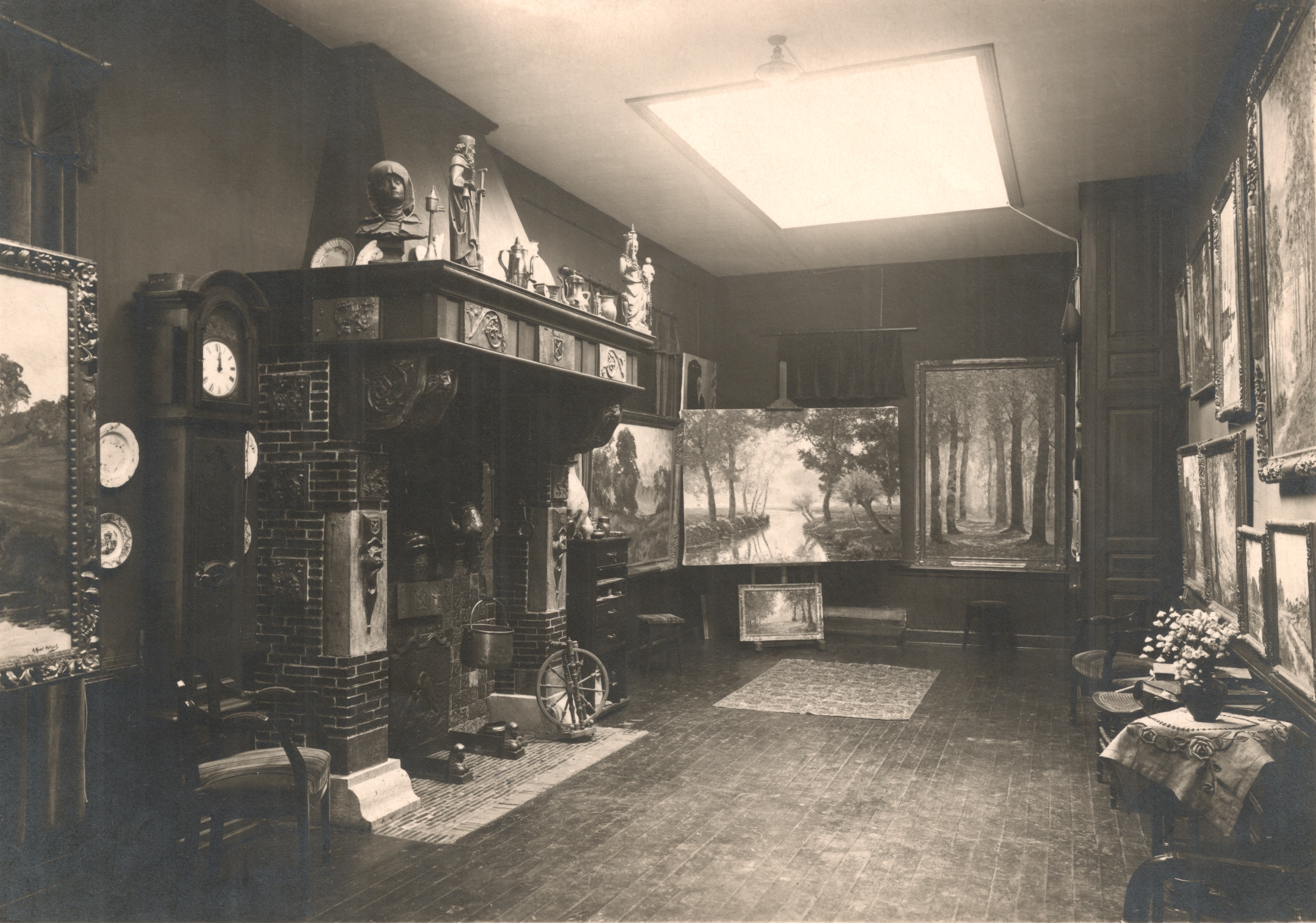 Atelier du peintre Marie Meuret-Philippot